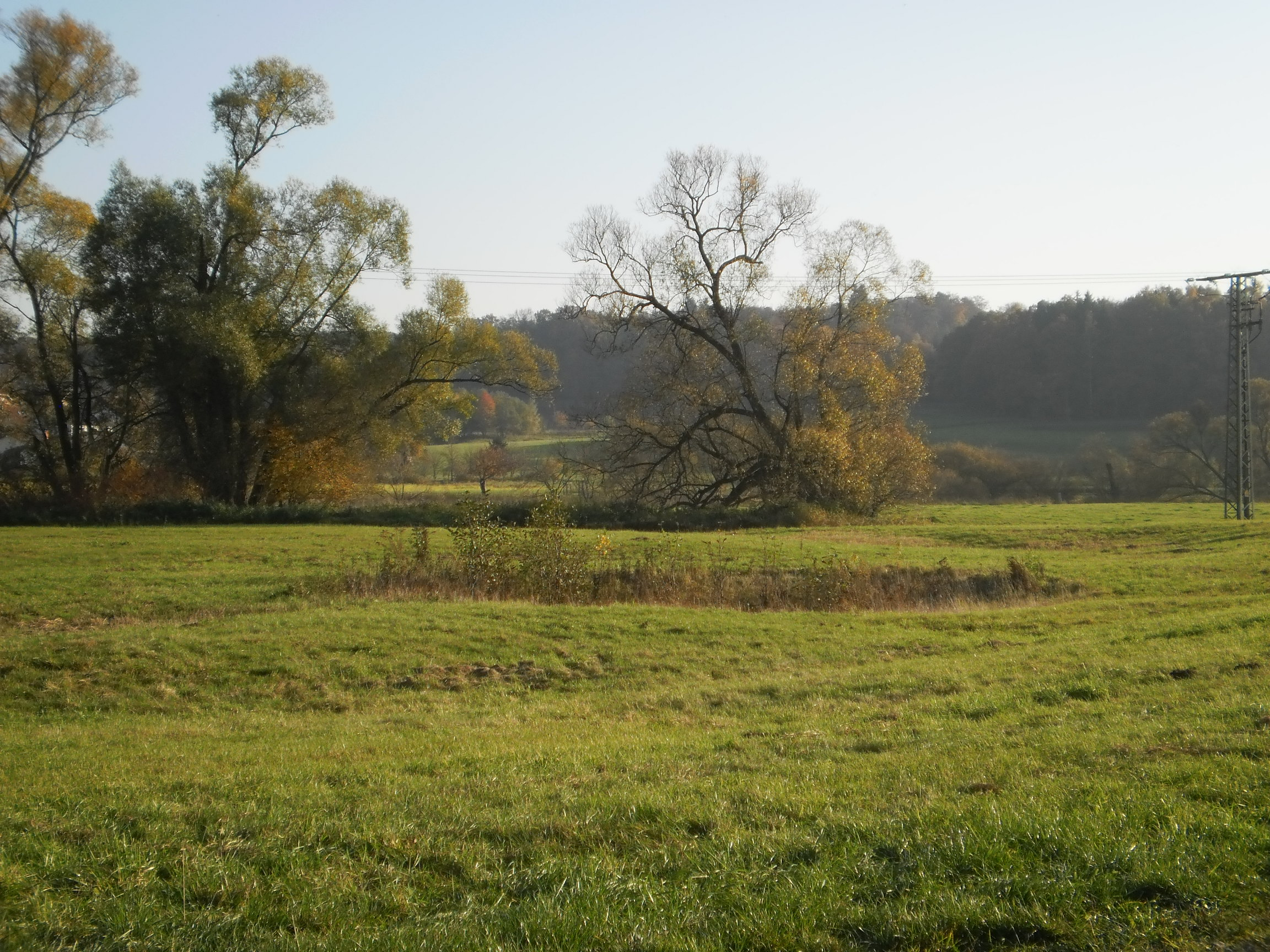 Die Lahnaue bei Sichertshausen vom Lahntalradweg her gesehen. Etwas weiter rechts vom Bild liegt Schloss Friedelhausen auf halber Höhe des Hangs.